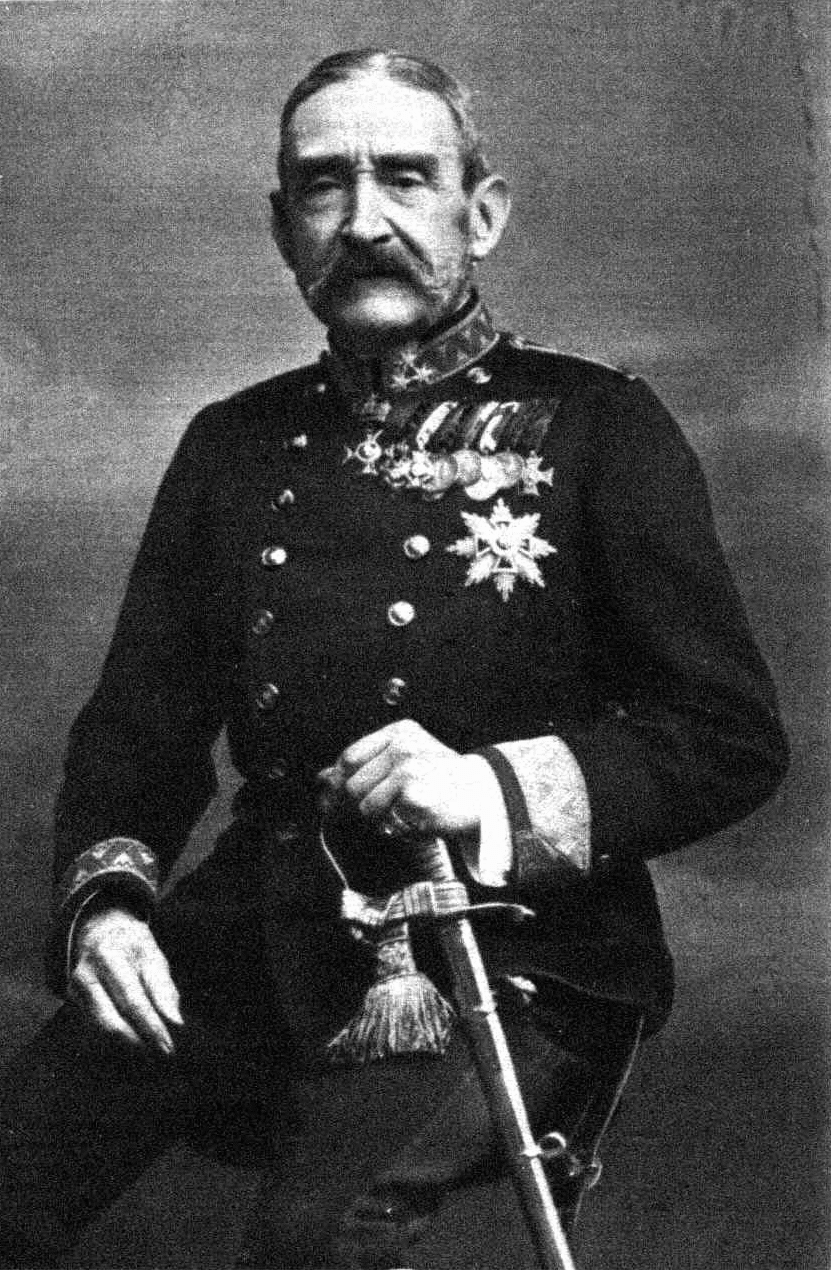 Arthur Heinrich Freiherr von Bolfras (1838-1922), Austrian general